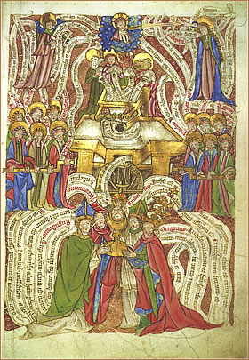 Graduale aus dem Augustiner-Chorfrauenstift Neuwerk in Erfurt; Erfurt, 14. Jh. Fol. 9r: Hostienmühle; Pergamenthandschrift mit (neben fol. 9r) 14 figürlichen Initialen in Deckfarbenmalerei auf Goldgrund; 190 Bll., Size H. 29,5 cm x B. 22 cm, Einband mit Zierstempeln, 15. Jh. Manuscript in the Badische Landesbibliothek, Karlsruhe, Germany Cod. St. Peter perg. 44